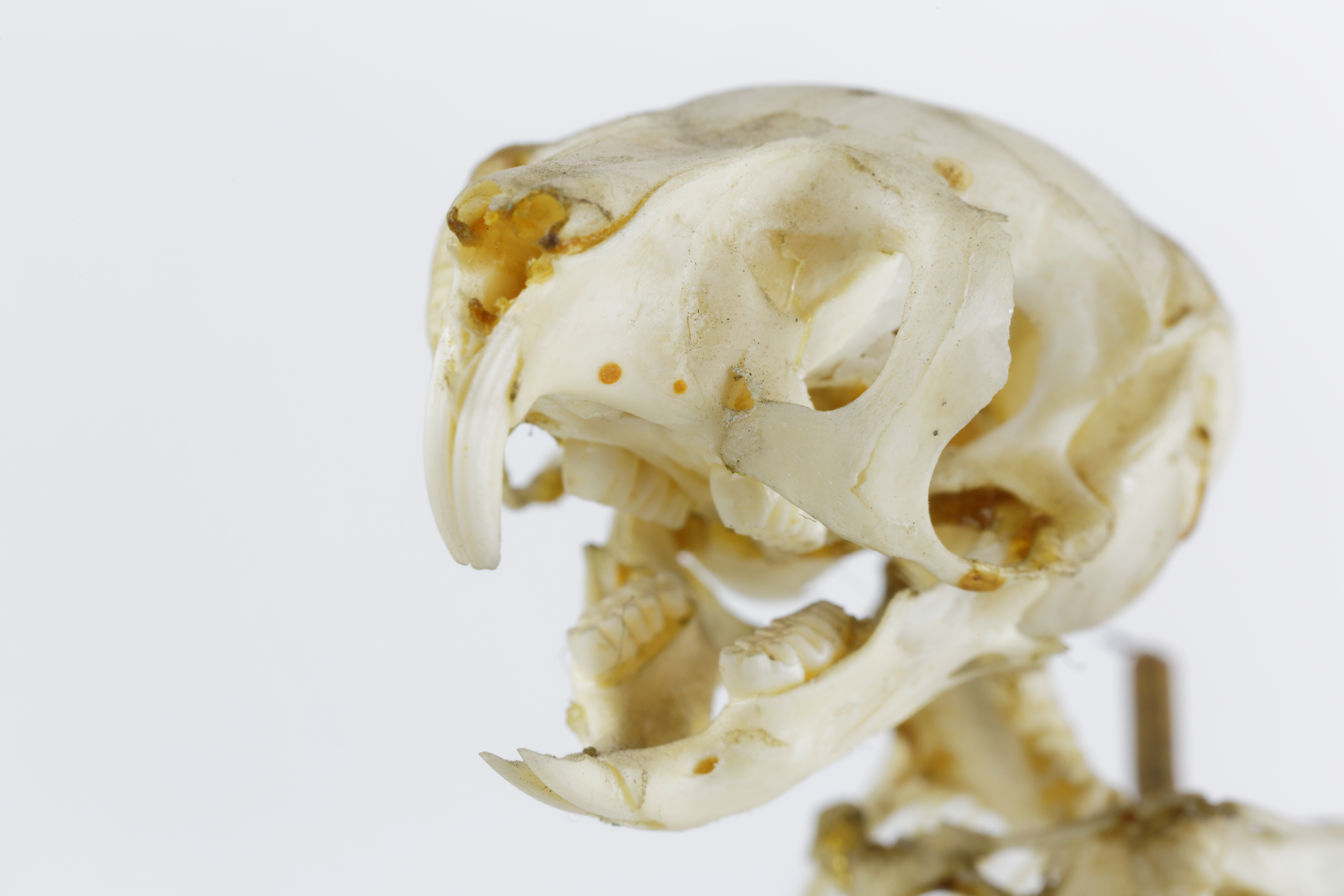 Nom vernaculaire Gerboise des steppes ou gerboise du désert Nom latin Jaculus jaculus Nature du spécimen Squelette monté Place dans le règne animal Chordé, Mammifère, Rongeur, Myomorphe Provenance Collection de Zoologie de l'Université Pierre et Marie Curie (UPMC) à Paris Dimensions du socle (cm) (triangle quelconque) 14,5 - 12 - 14 - 1,1 (h) (plastique) Longueur approximative du spécimen (cm) 13 (queue non comptée) (donnée non biométrique) (10-12 pour le corps/16-20 pour la queue dans la nature) Hauteur total du spécimen (cm) environ 15,3 (donnée non biométrique) Biologie Petit rongeur des déserts avec de longues pattes postérieures. Très véloce. Sa longue queue lui sert de balancier. La gerboise vit dans un terrier.